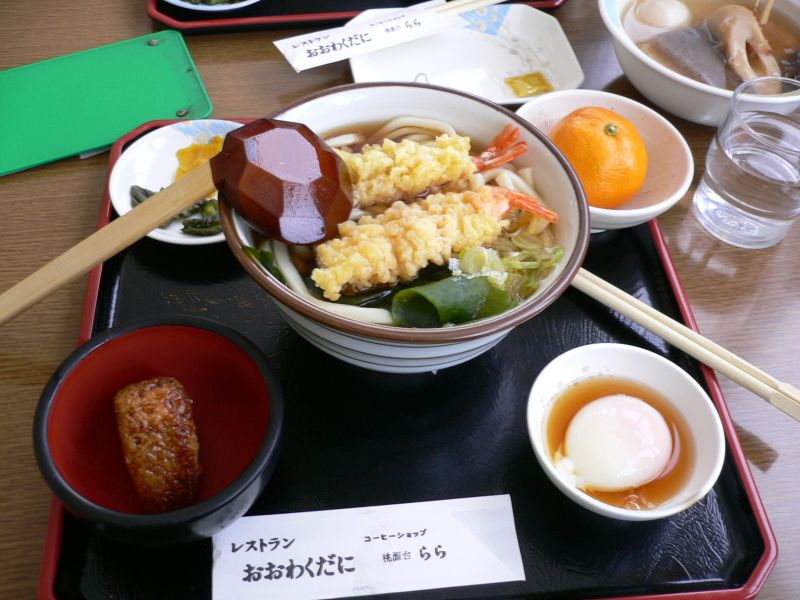 温泉卵つき天ぷらうどん定食（神奈川県足柄下郡箱根町仙石原台ケ岳1251、箱根ロープウェイ大涌谷駅3Fの「レストラン大涌谷」（現・大涌谷スカイレストラン））